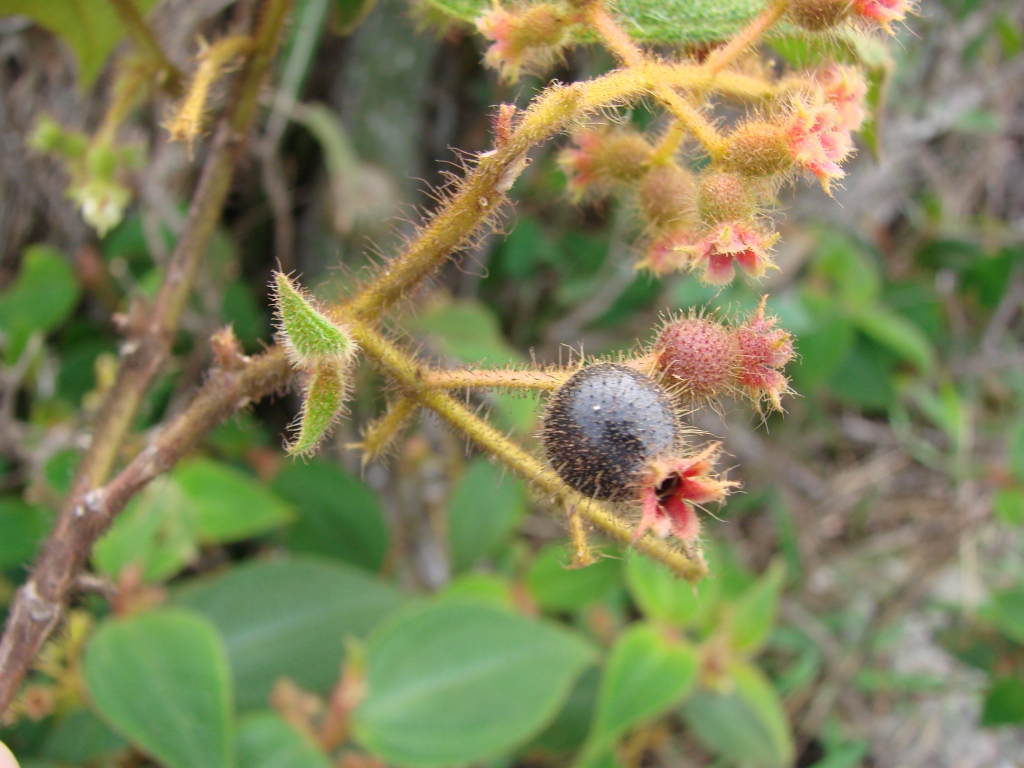 Clidemia capitellata (Bonpl.) D. - MELASTOMATACEAE - Chapada Diamantina - Parque Natural Municipal Morro do Pai Inácio - Palmeiras - Bahia - Brasil.